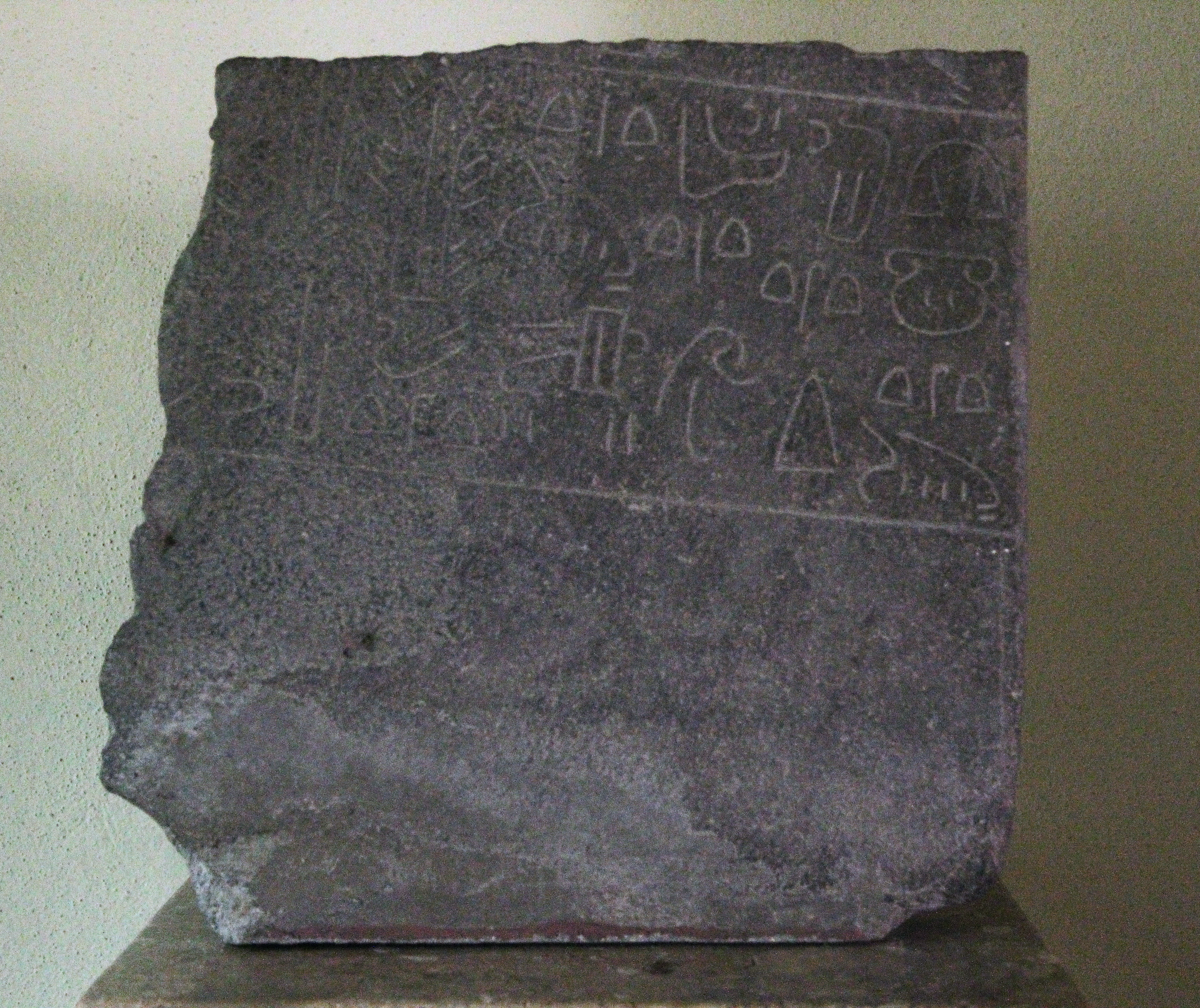 Archäologisches Museum Niğde, Türkei, Hieroglyphen-luwische Inschrift von Veliisa